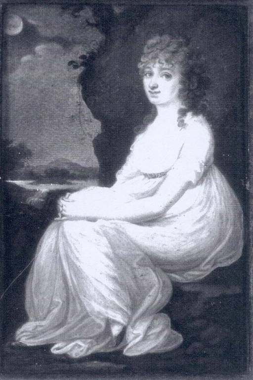 Аполлония Матвеевна Бирон, ур. Понинская (1760—1800)